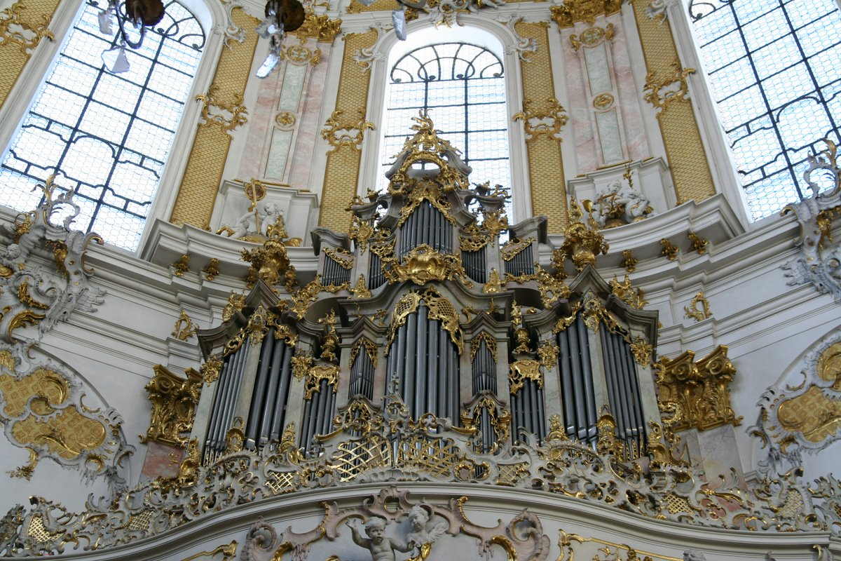 Klosterkirche Ettal, Orgel